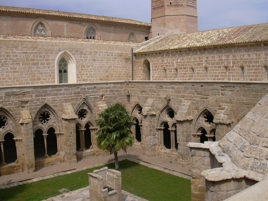 Rueda - Claustro - Vista general